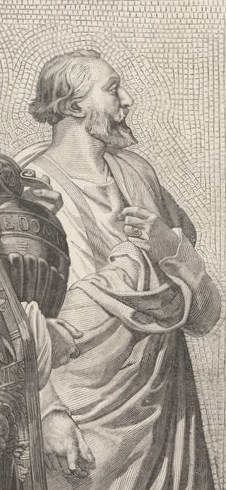 "Salon de 1881 : Le Triomphe de Clovis, fragment de la frise du Panthéon. Fresque de M. Paul-Joseph Blanc. (Dessin de M. A[lbert] Duvivier, gravure de M. [Émile] Thomas)". Sur ce détail : Gambetta en Aurelianus.